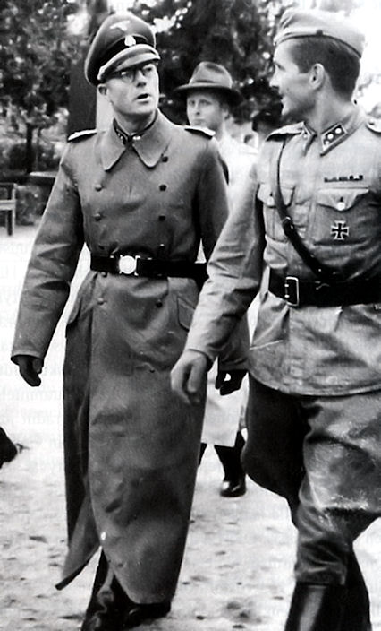 Vasemmalla Majuri Kalervo Kurkiala suomalaisen SS-pataljoonan sotilaspastori ja yhdysupseeri vierellään pataljoonassa palvellut luutnantti Pohjanlahti Kuvattu Helsinhin Hietaniemen hautausmaalla 19. syyskuuta 1943